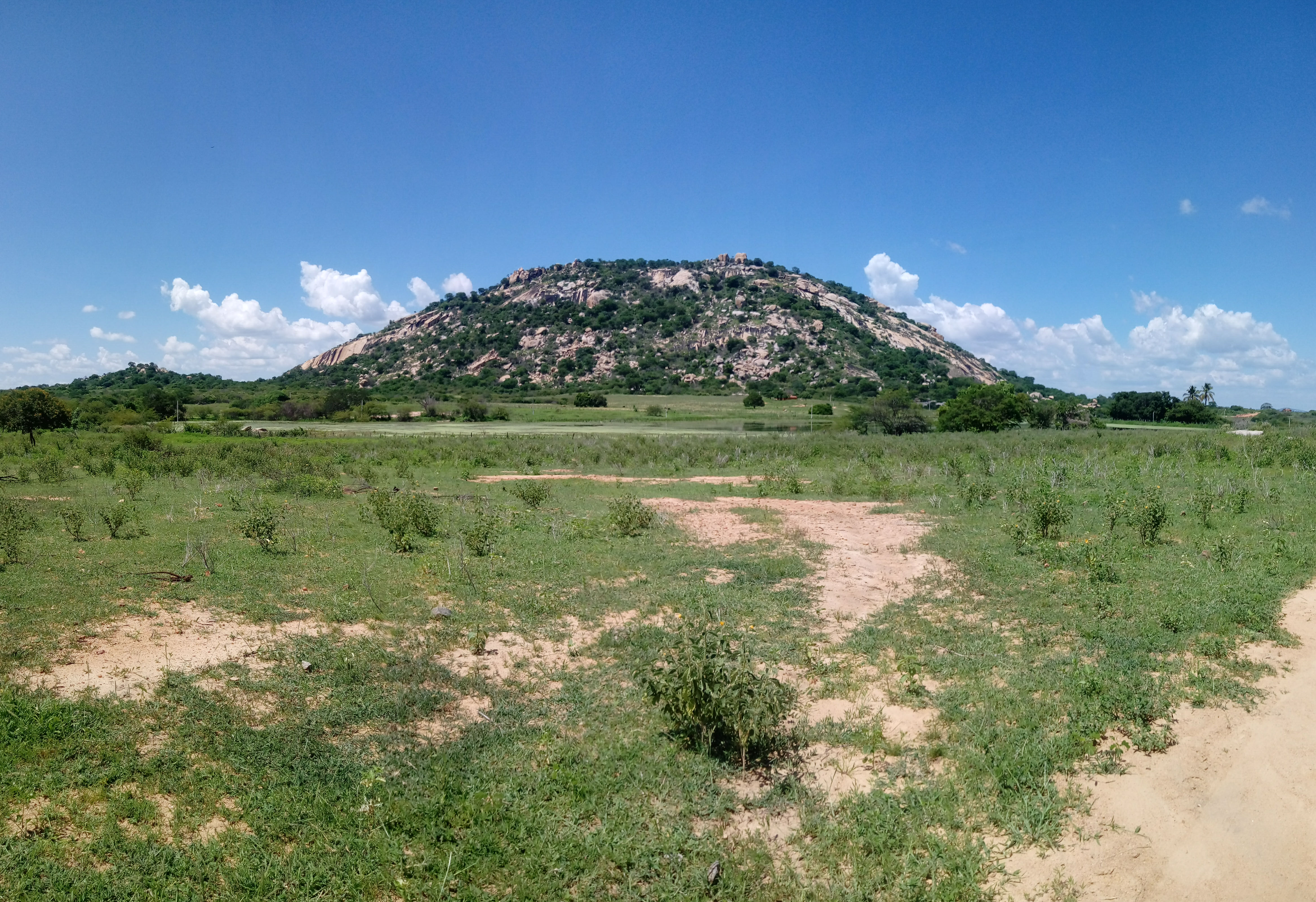 Panorama da caatinga em época de chuvas, com destaque para o Serrote da Caixa d'Água, Paulista-PB.